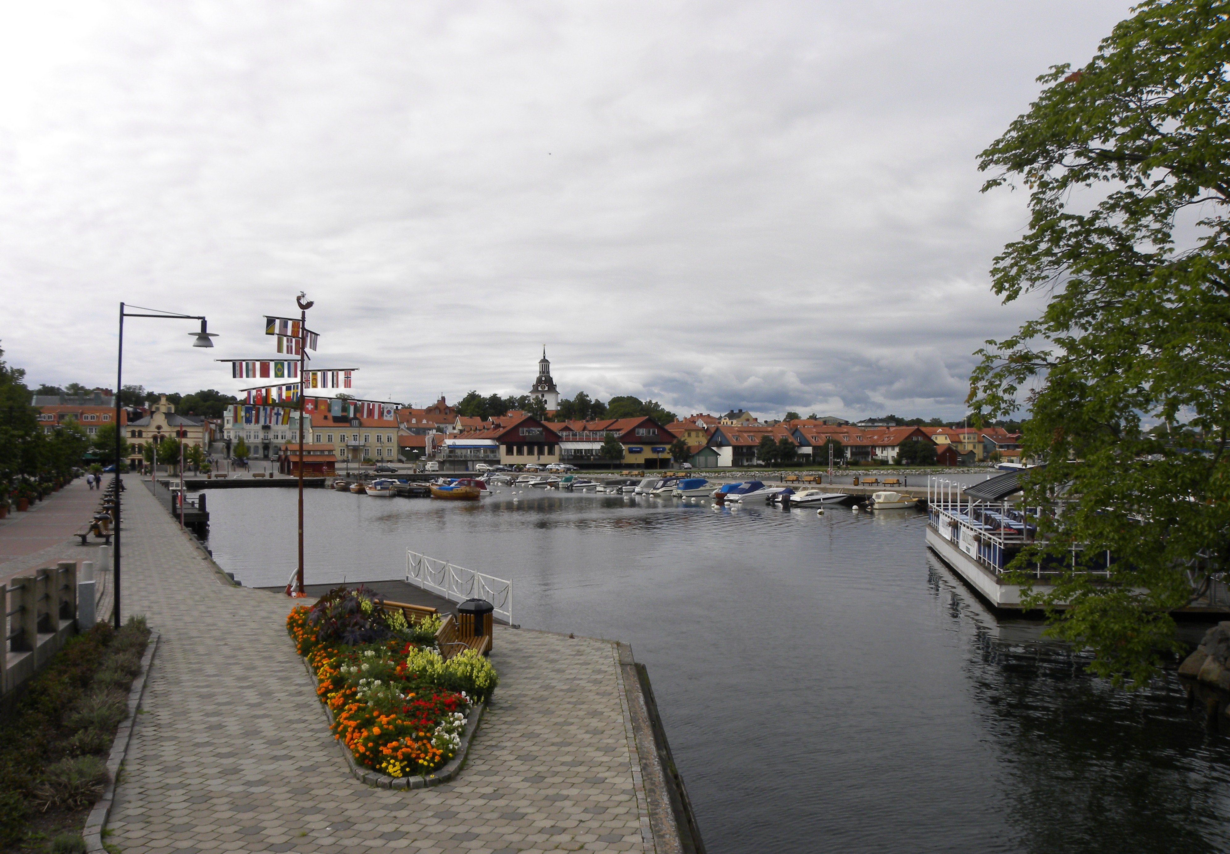 Yachthafen in Västervik